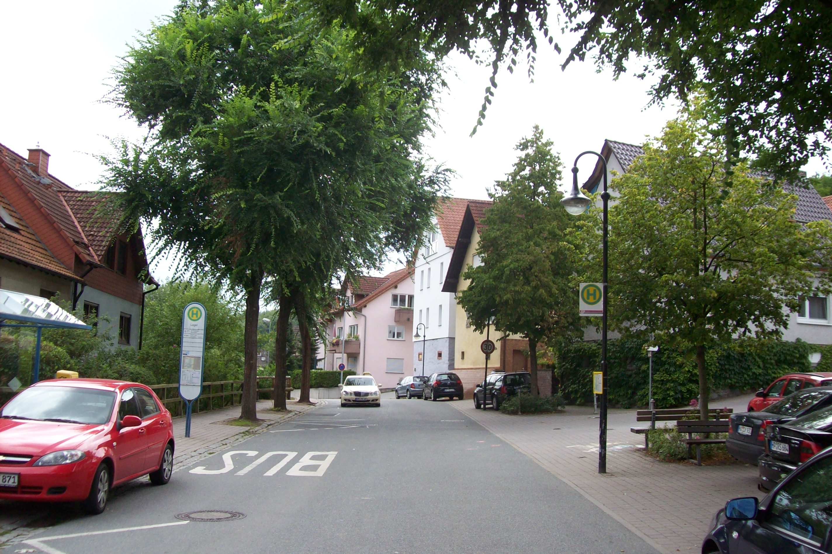 Die Ortsmitte von Bensheim-Hochstädten, Hessen, Deutschland